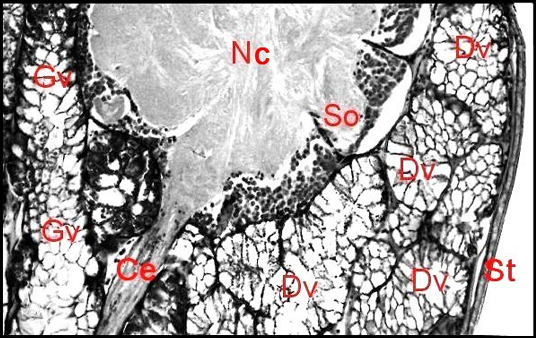 Diguetia canities, diverticules de la glande à venin entourant le système nerveux dans le céphalothorax jusqu' à la cauda equina. Coupe histologique.